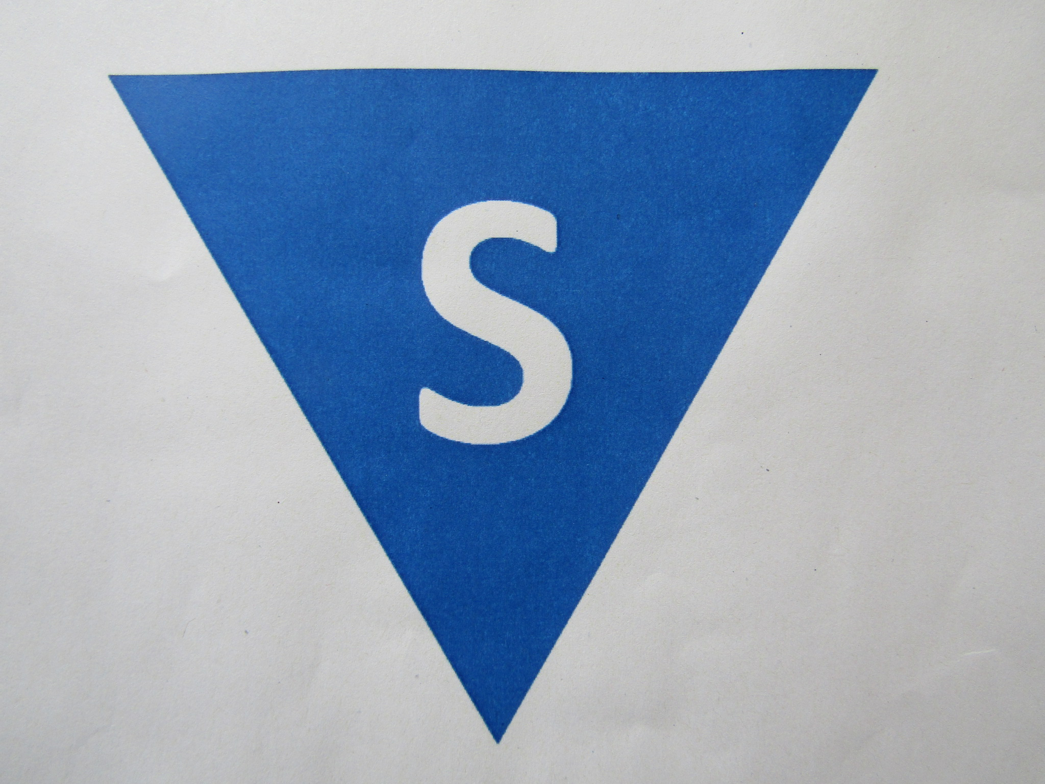 Distintivo que llevaban los apátridas en los camppos de concentración nazis con la "S" de spanier.